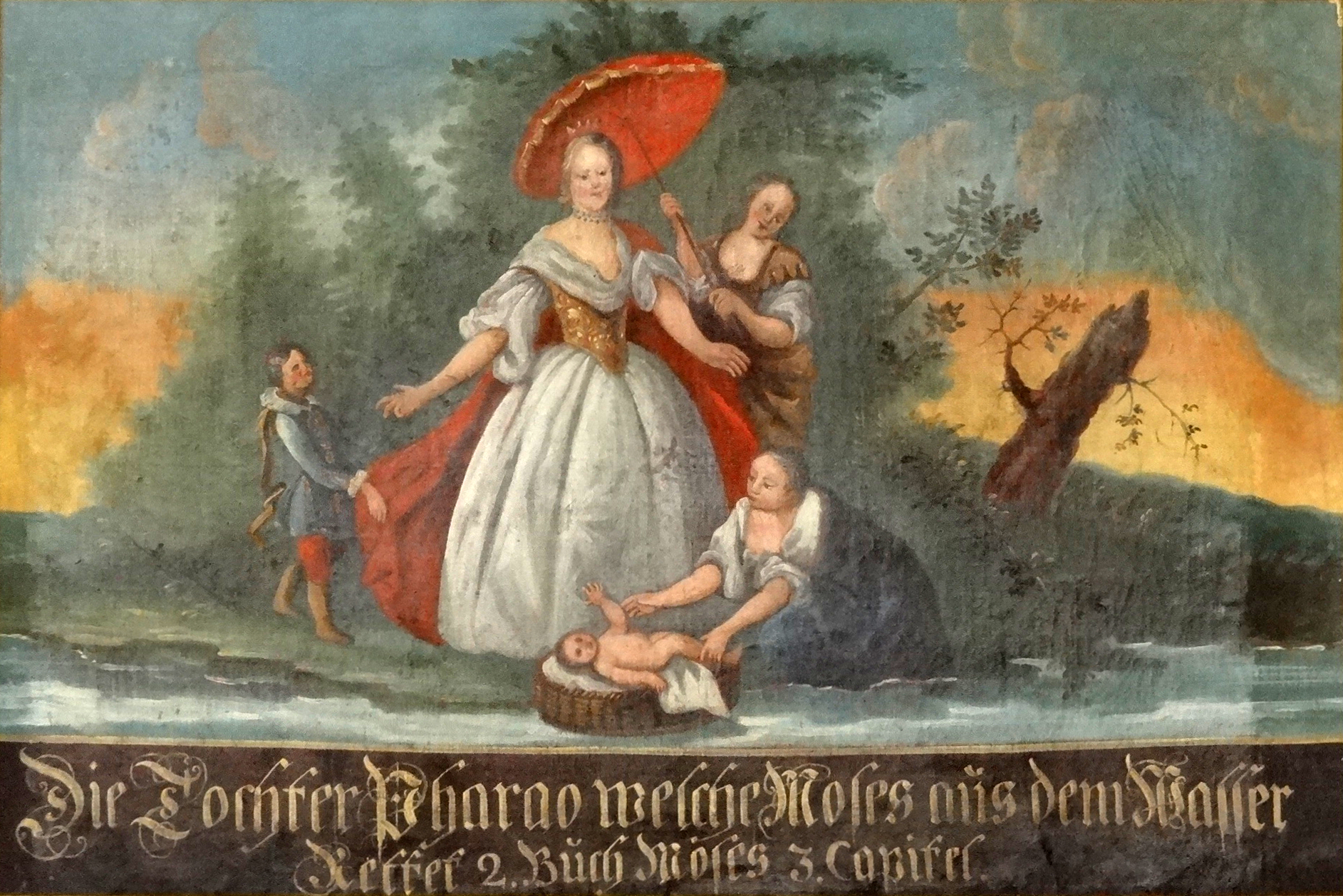 Oil paintings in Jakobuskirche Lang-Göns